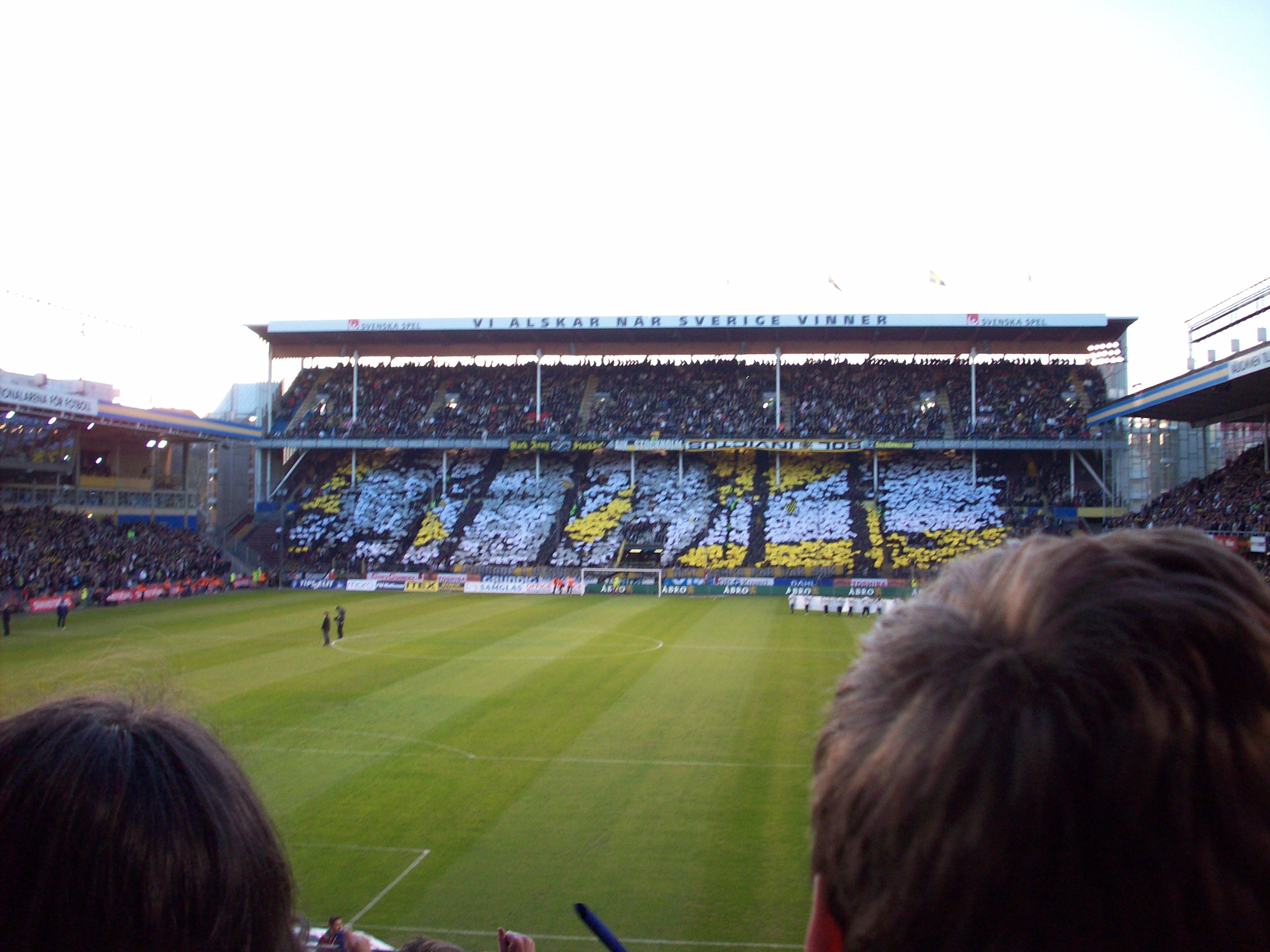 Tifo before the Fotbollsallsvenskan derby game between AIK and Djurgårdens IF.